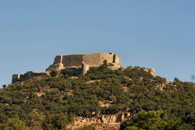 Abu Qubeis eigenes Foto von 2004 public domain Mewes 21:03, 20. Feb 2005 (CET) Gesamtansicht